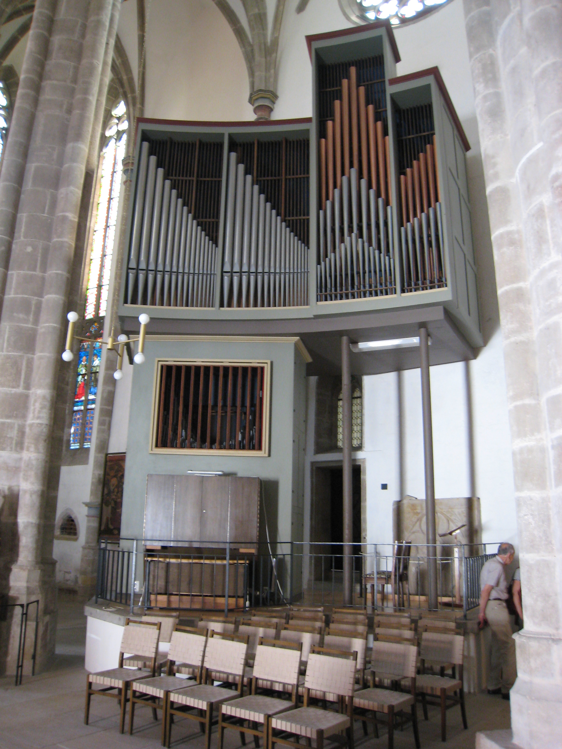 Liebfrauenkirche Arnstadt 2